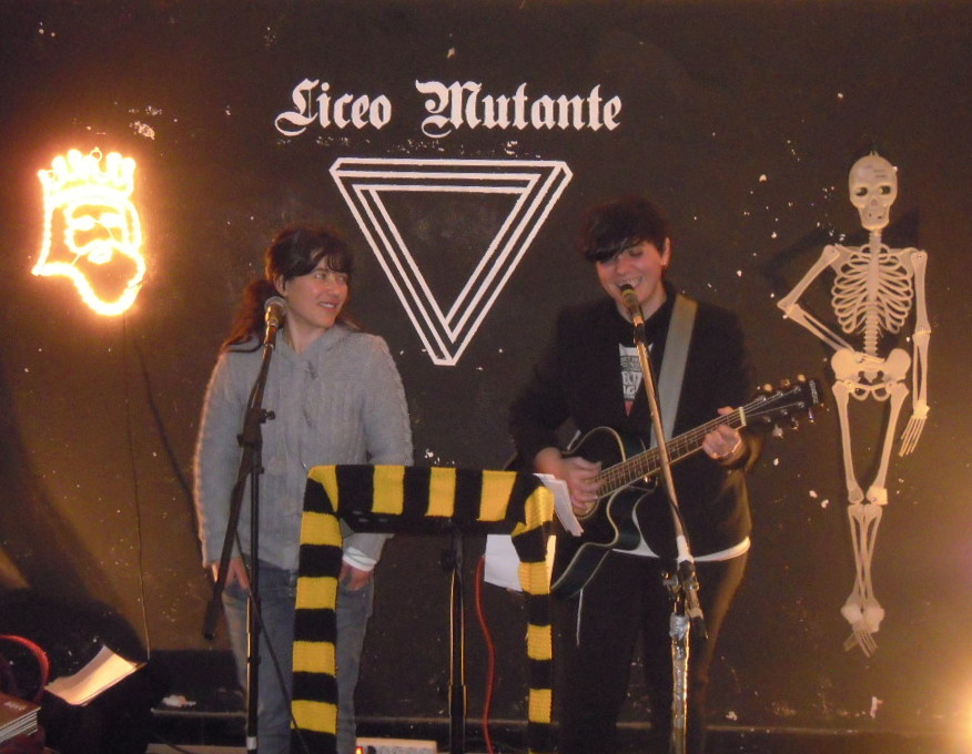 María Lado e Lucía Aldao no Liceo Mutante